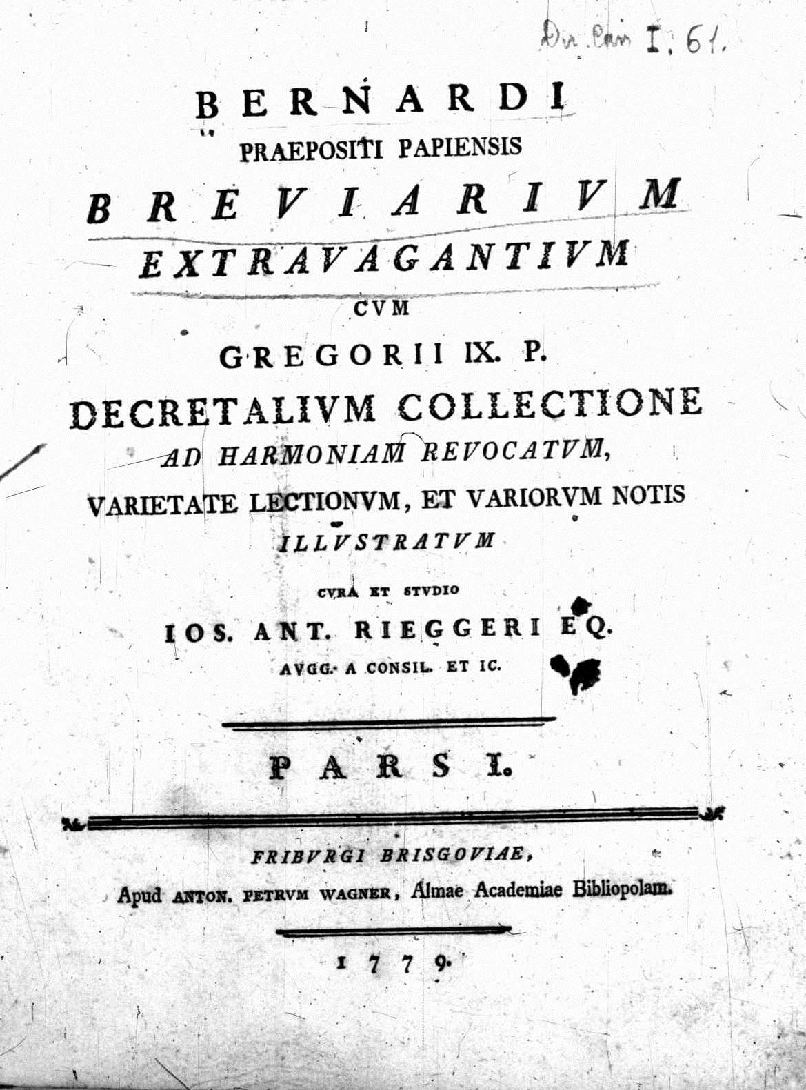 Frontespizio